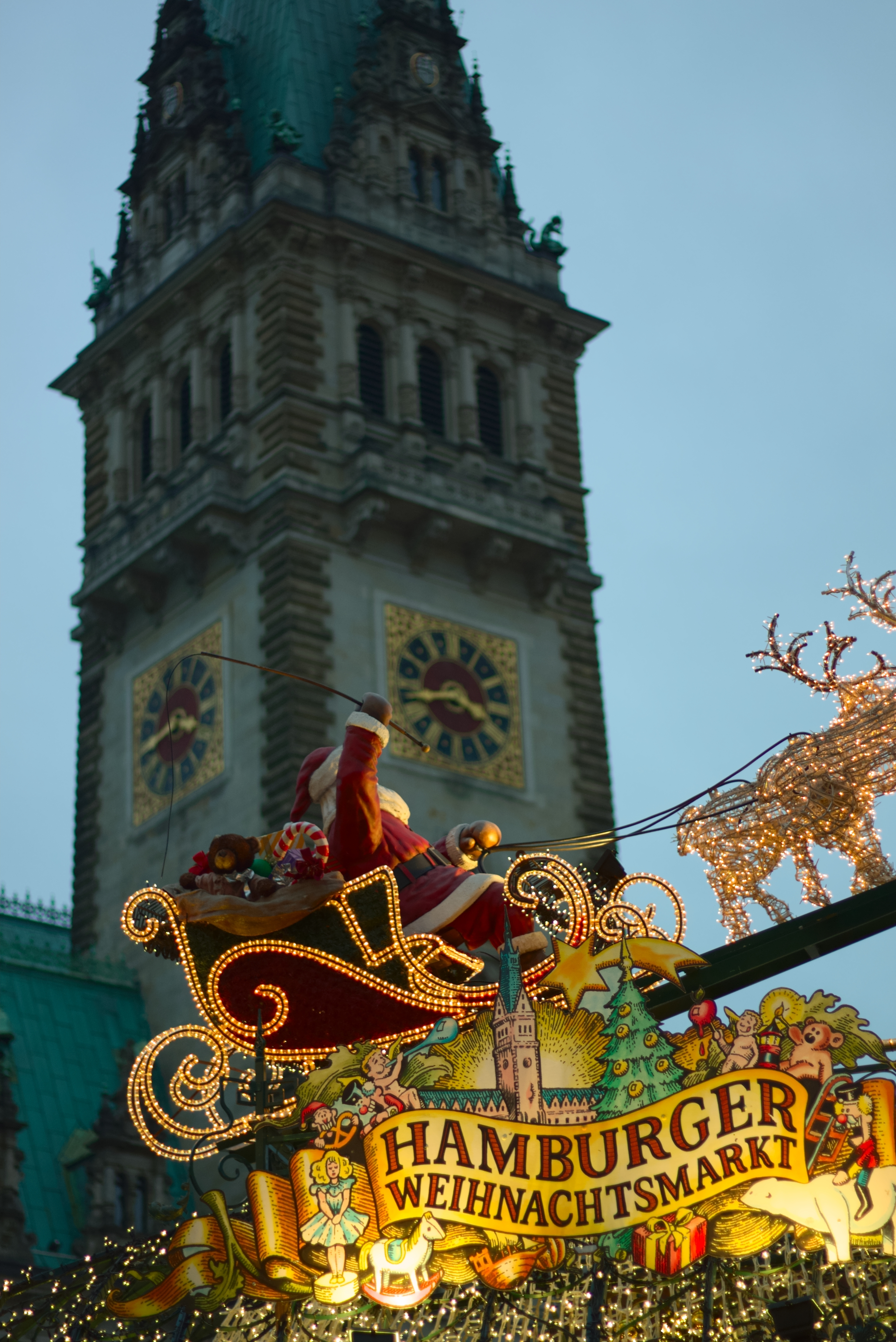 Le marché de Noël de l'hôtel de ville est le plus important de Hambourg. Au total, on en dénombre sept à proximité immédiate du centre-ville.